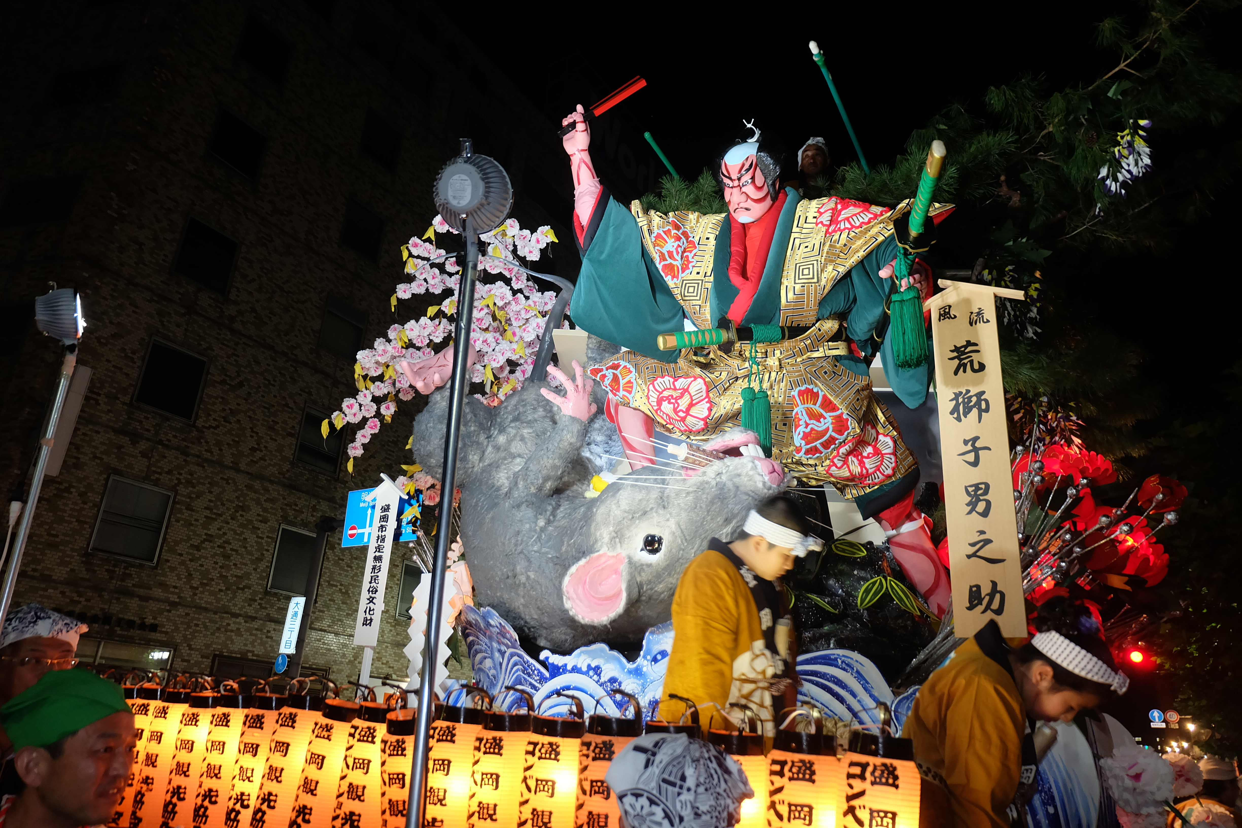 夜間運行